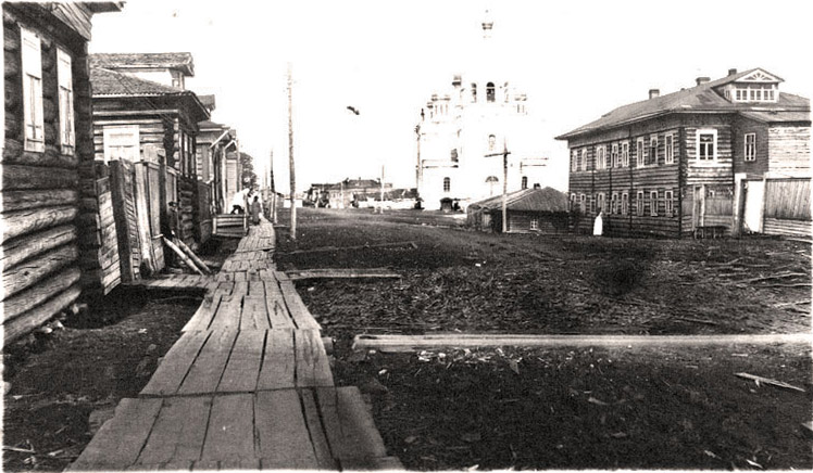 Улица в Кеми. На заднем плане — Благовещенский собор.